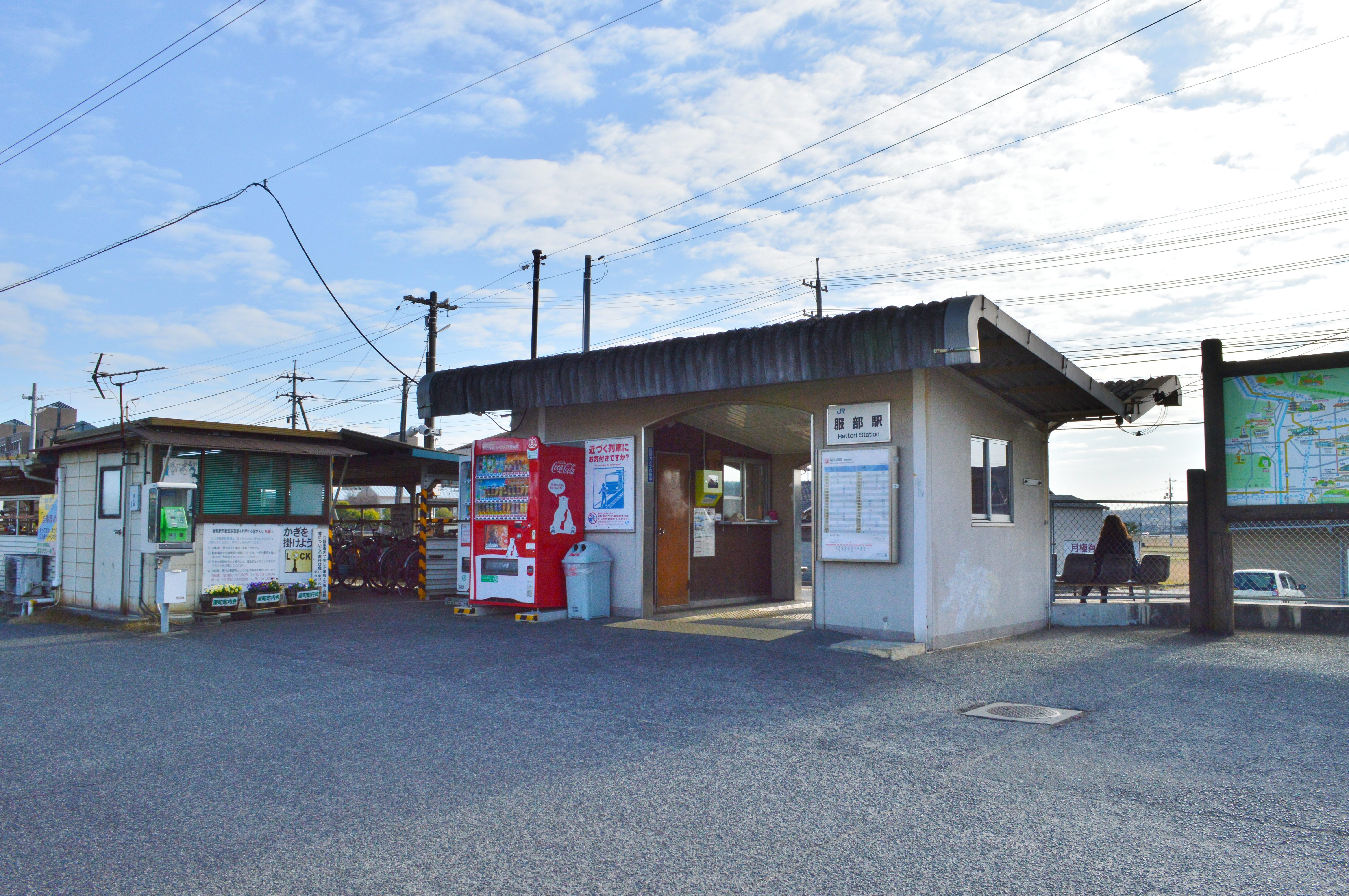 服部駅 (総社市) 駅舎